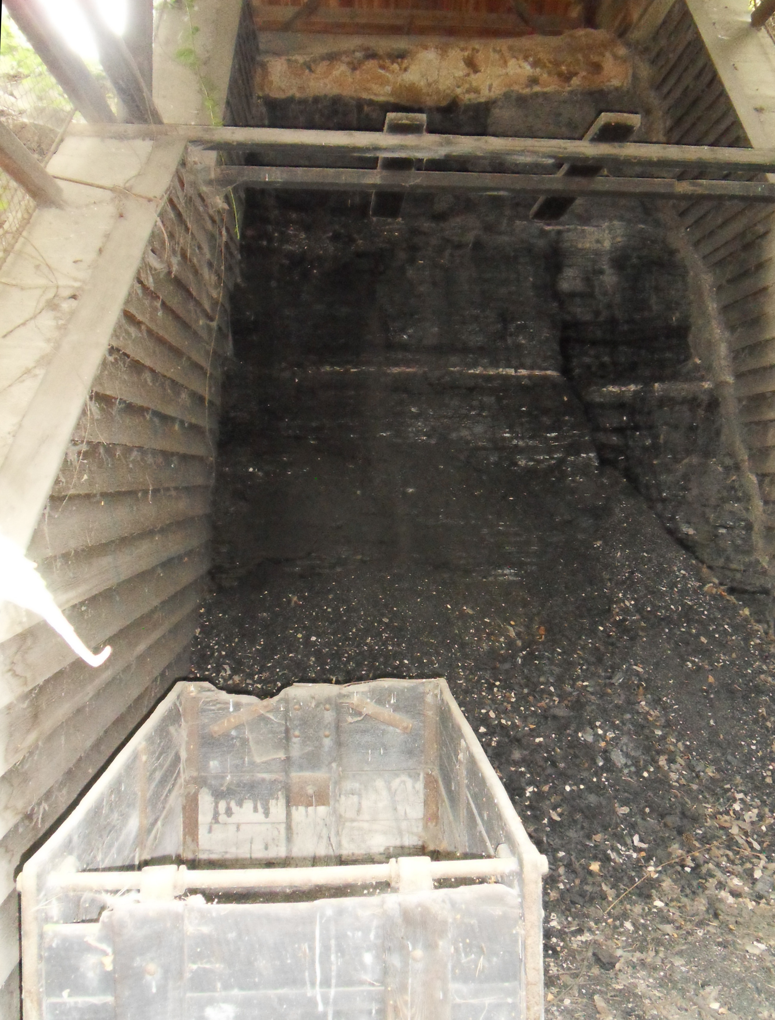 Přírodní památka "Bašta" u obce Břasy (okres Rokycany). Detail výchozu uhelné sloje.